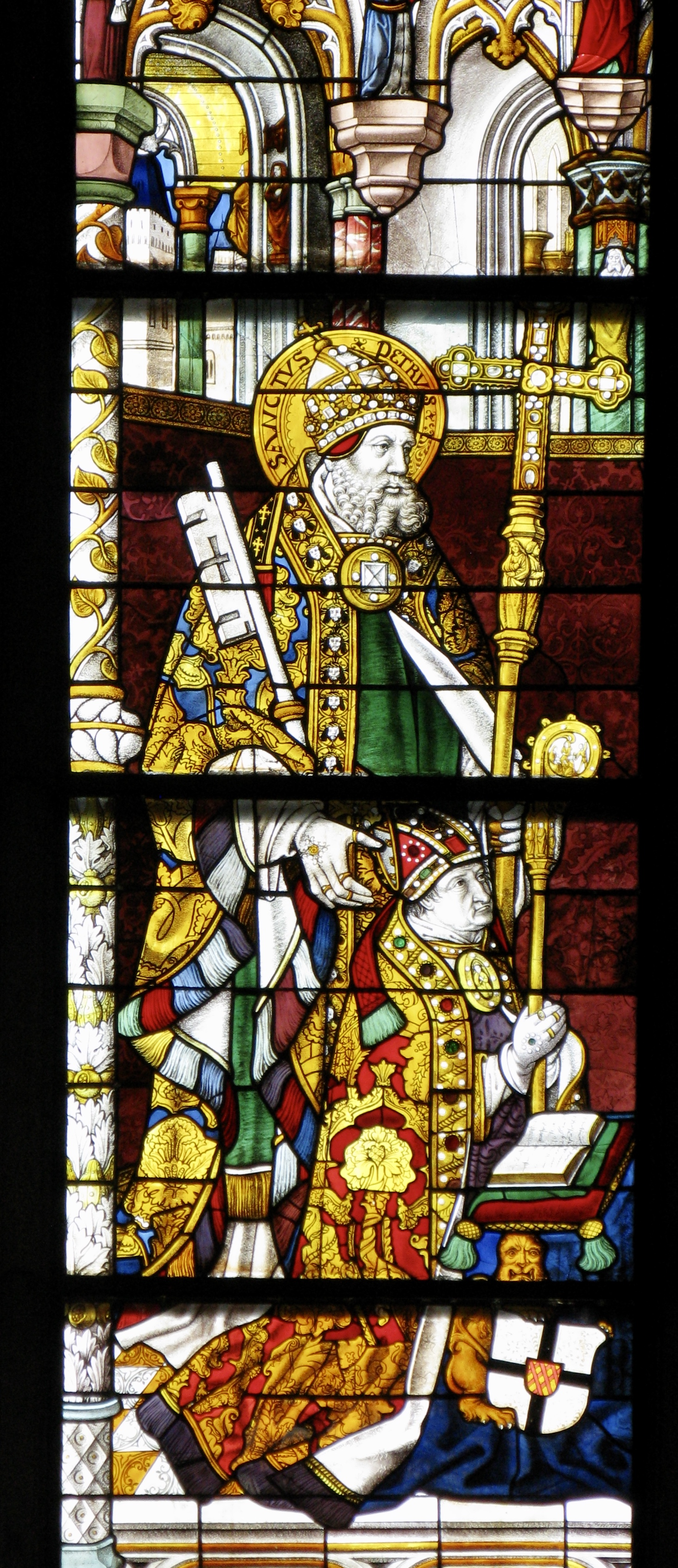 Kölner Dom, Domkloster 4This is a photograph of an architectural monument.